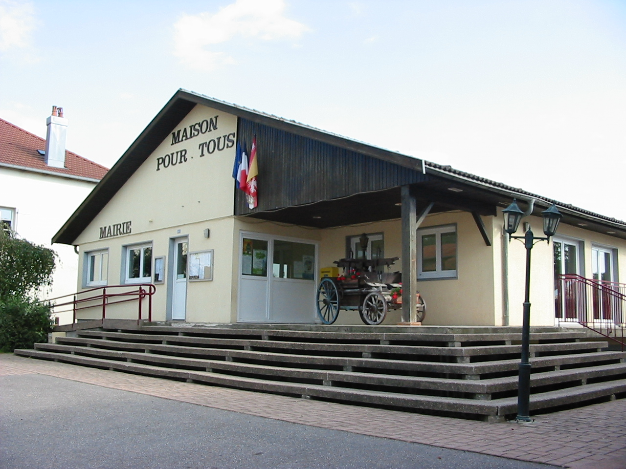 Housseras, commune du département des Vosges. La mairie - maison pour tous - et l'antique pompe à incendie.